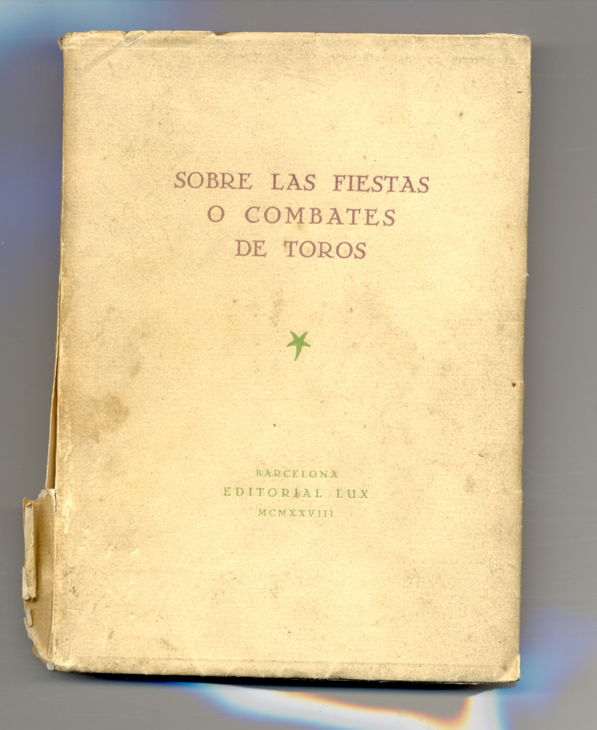 Portada del libro "Sobre las fiestas o combates de toros", publicado en Barcelona en 1928 por la editorial LUX